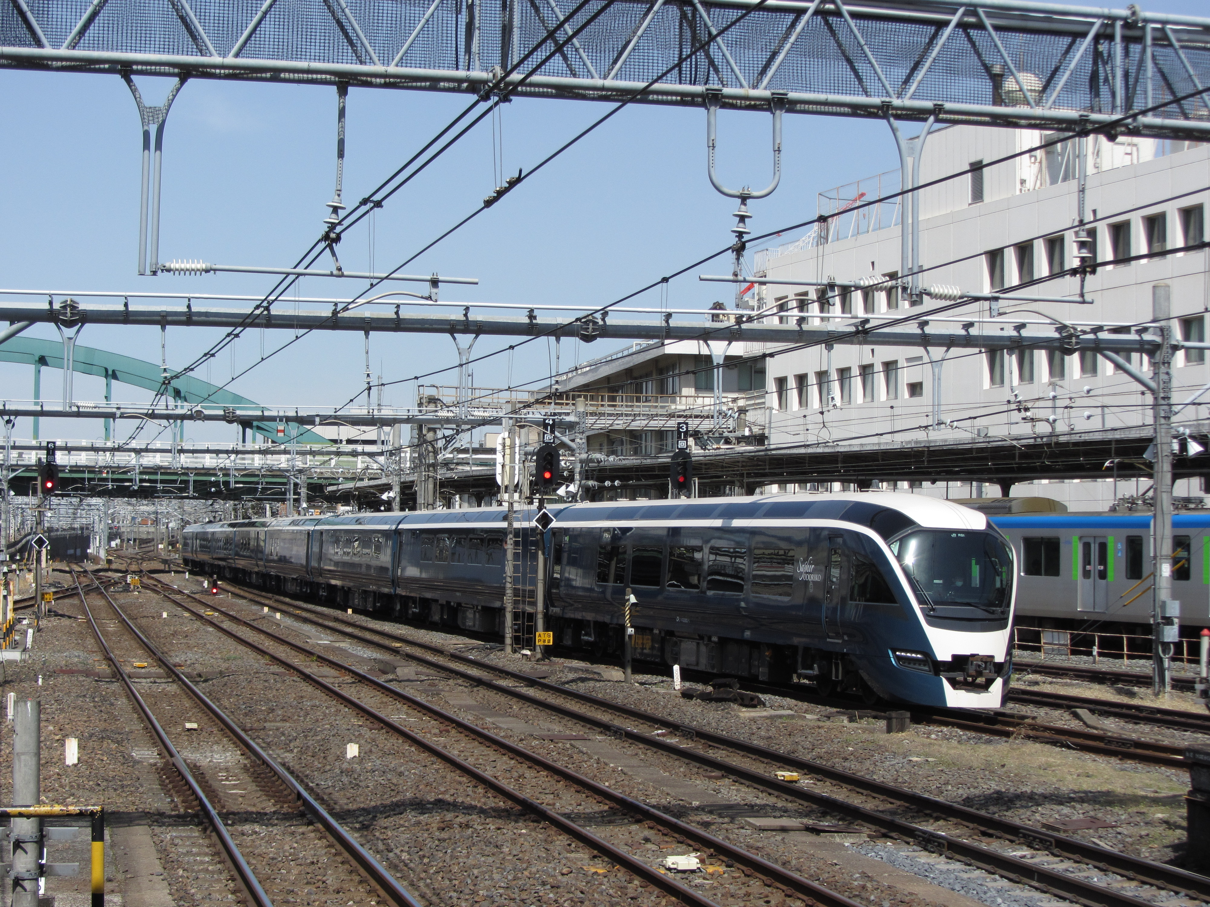 Series E261 RS1 at Ōmiya, Tokyo, Japan 21/03/20